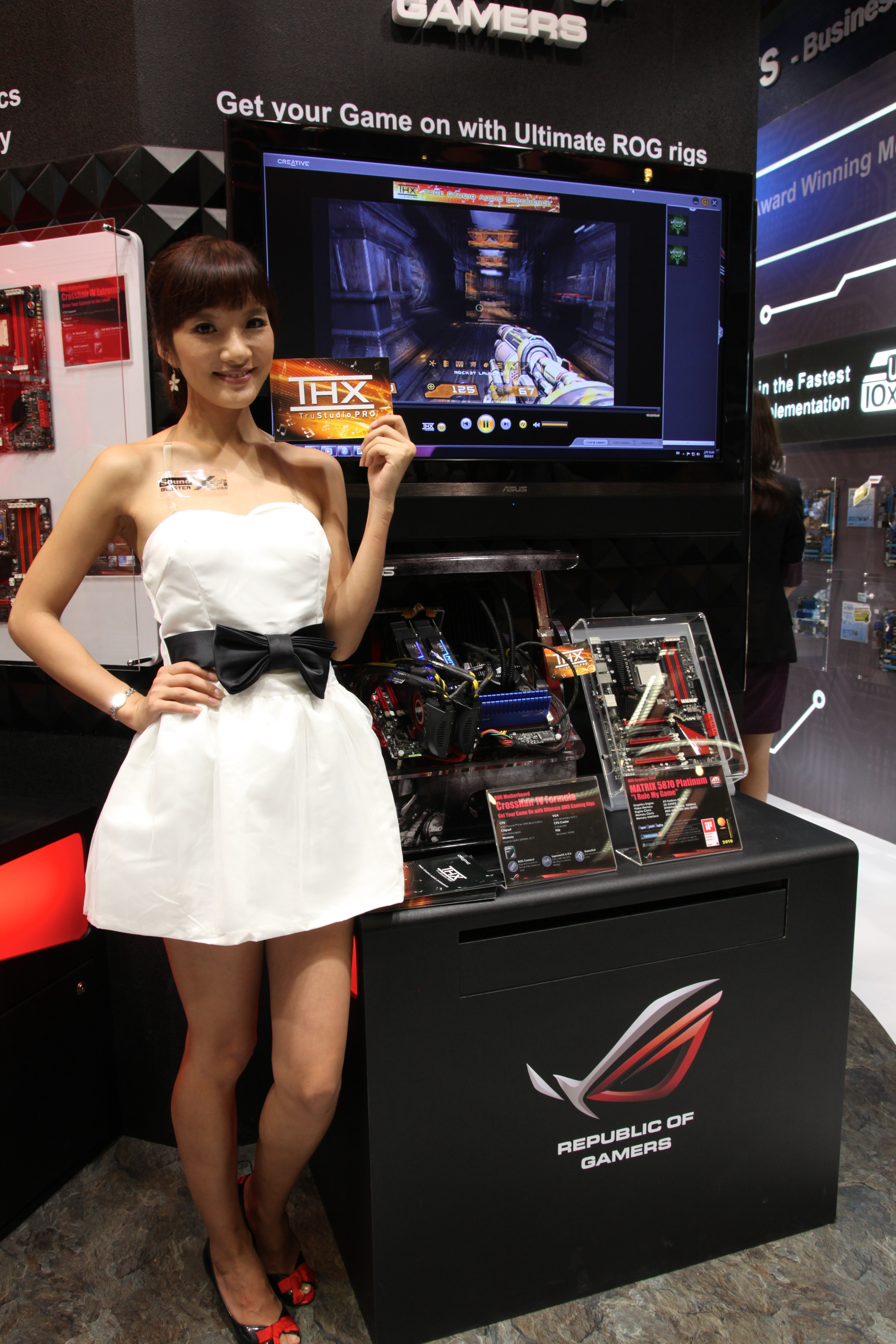 中文（台灣）: 2010台北國際電腦展，華碩電腦宣傳模特兒與玩家共和國系列產品。